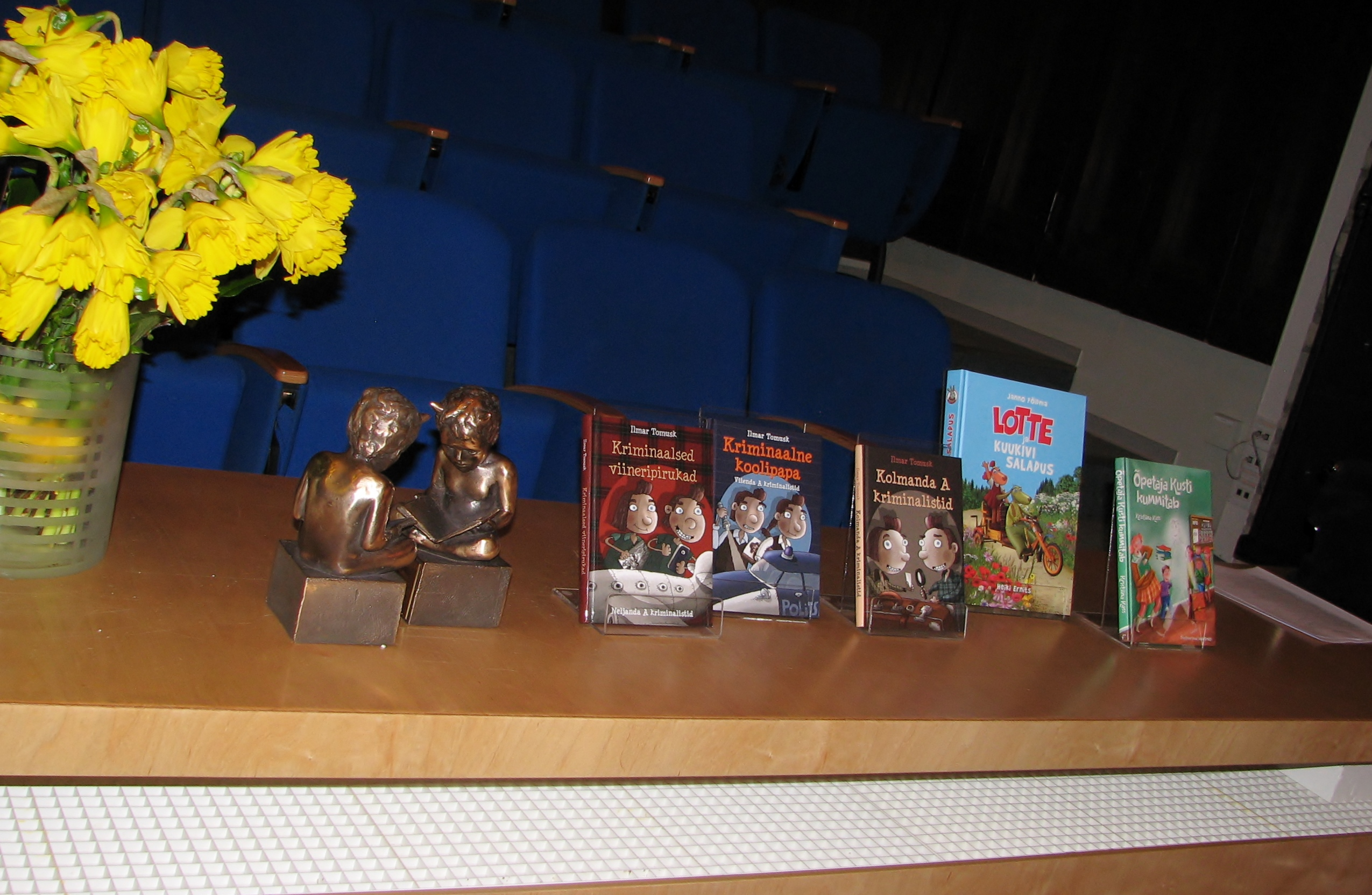 Nartsissid, 2 Nukitsa kuju ja auhinnatavad raamatud Nukitsa konkursi auhindade üleandmistseremoonia eel